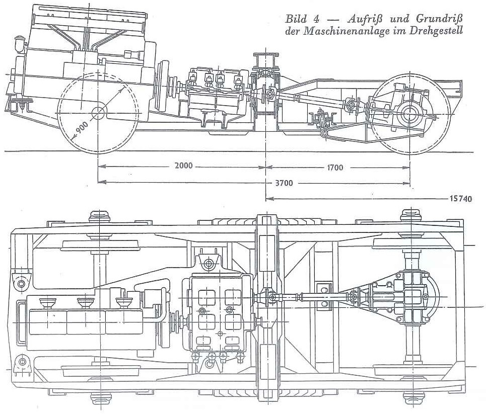 Prinzipskizze des Triebdrehgestelles des NEB T 4